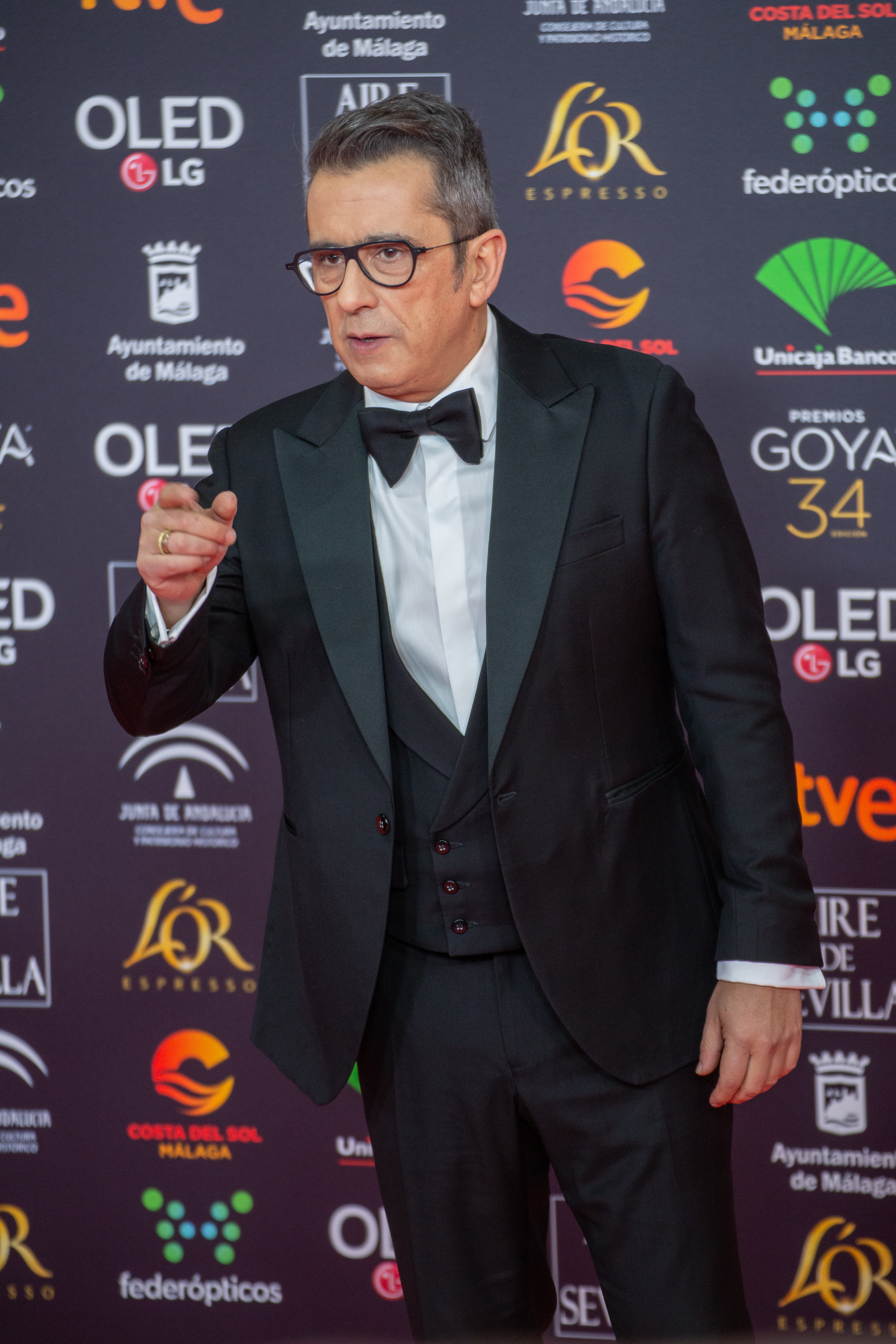 Andreu Buenafuete en la afombra roja de la ceremonia de entrega de los Premios Goya 2020 celebrada en Málaga